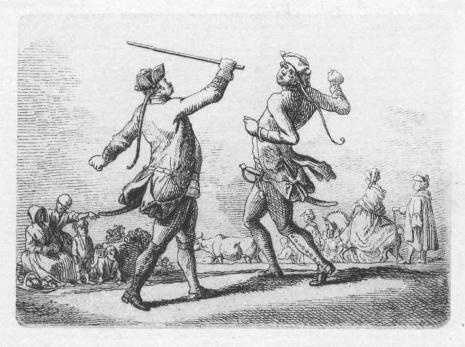 Militärstrafen. Wie ein Schurke Prügel empfängt. (Beschreibung lt. Quelle) Blatt 1 Blatt 2